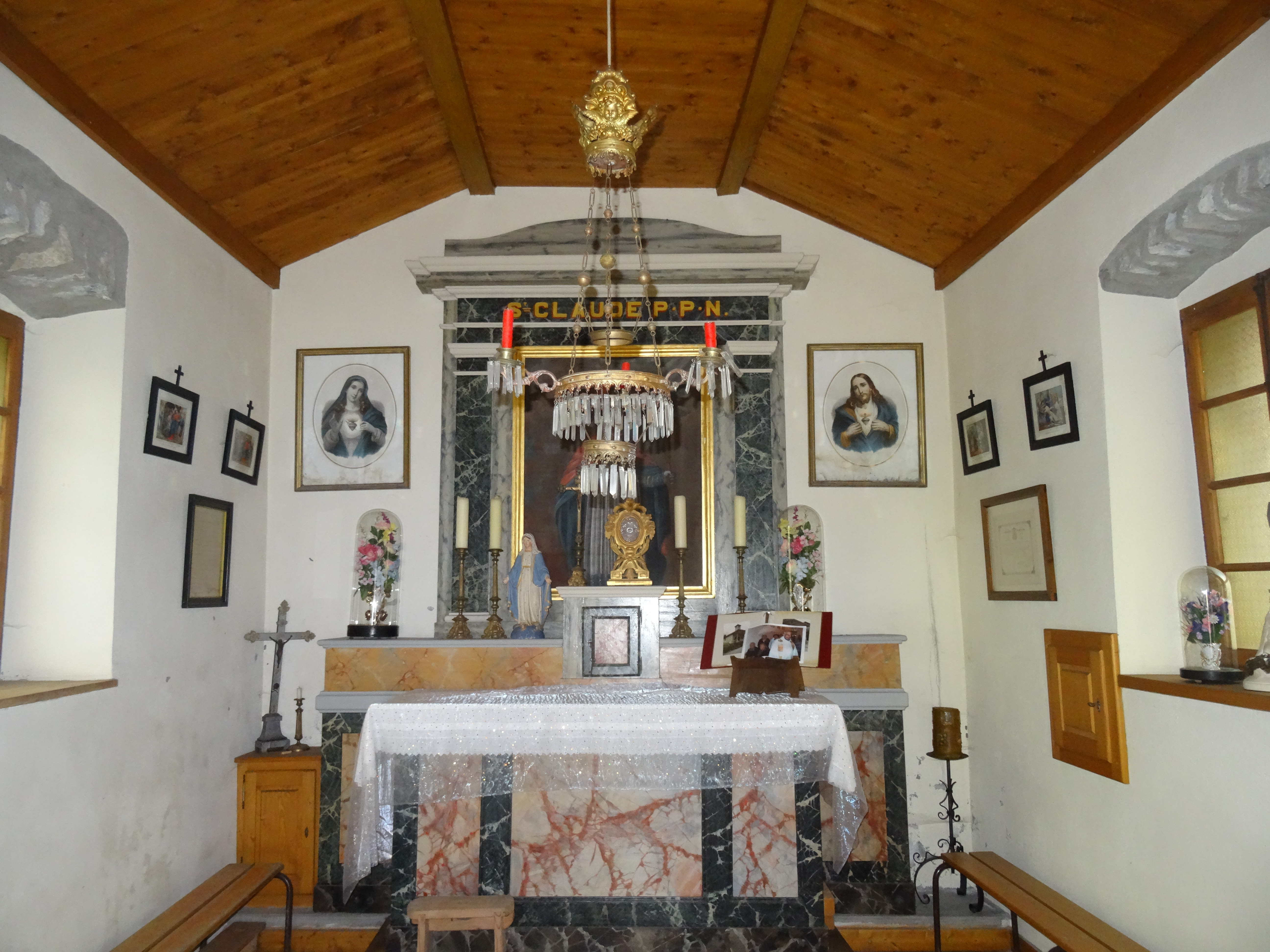 Intérieur de la chapelle du hameau de "La Ville".